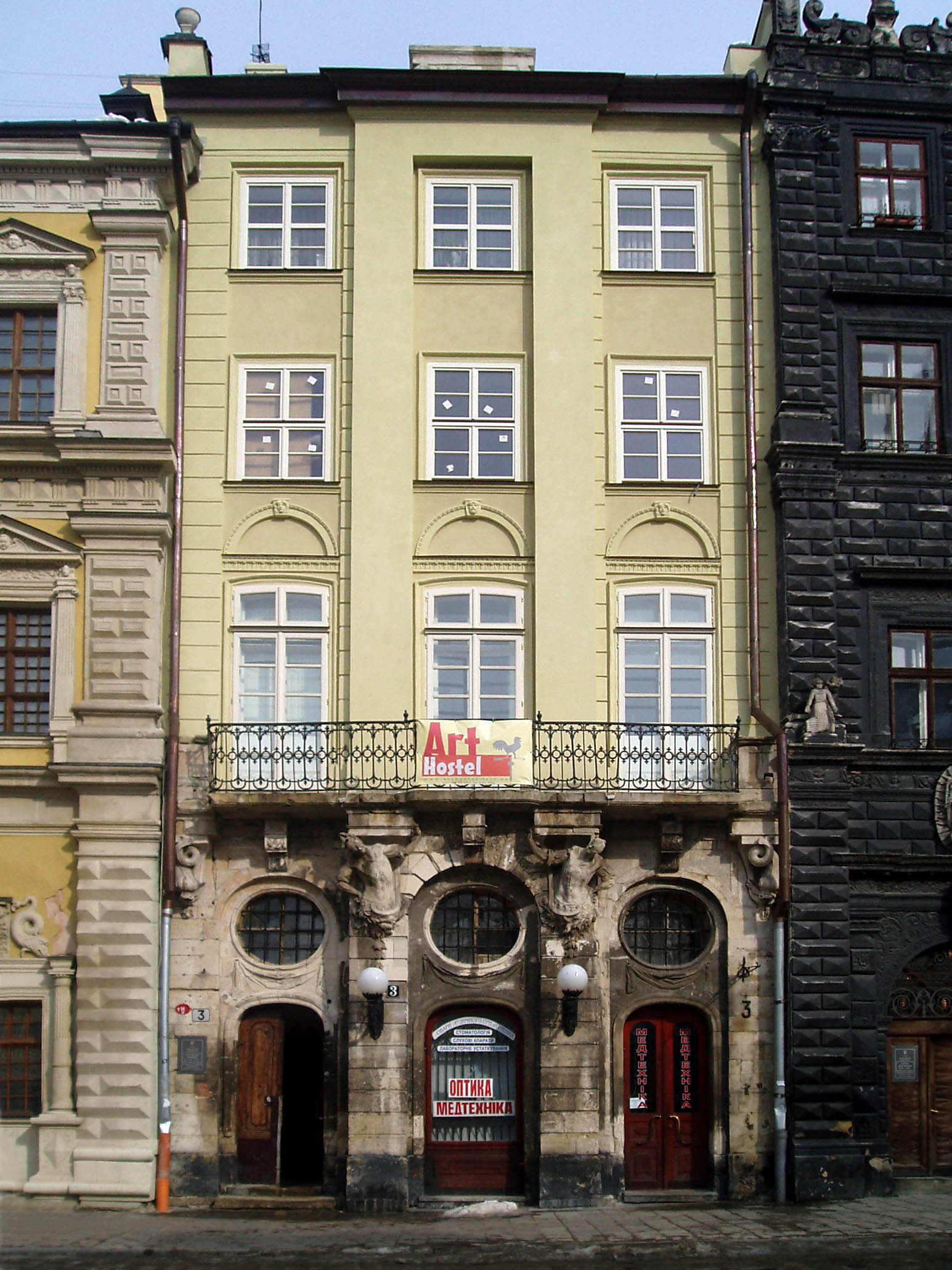 Будинок № 3 на площі Ринок у Львові.